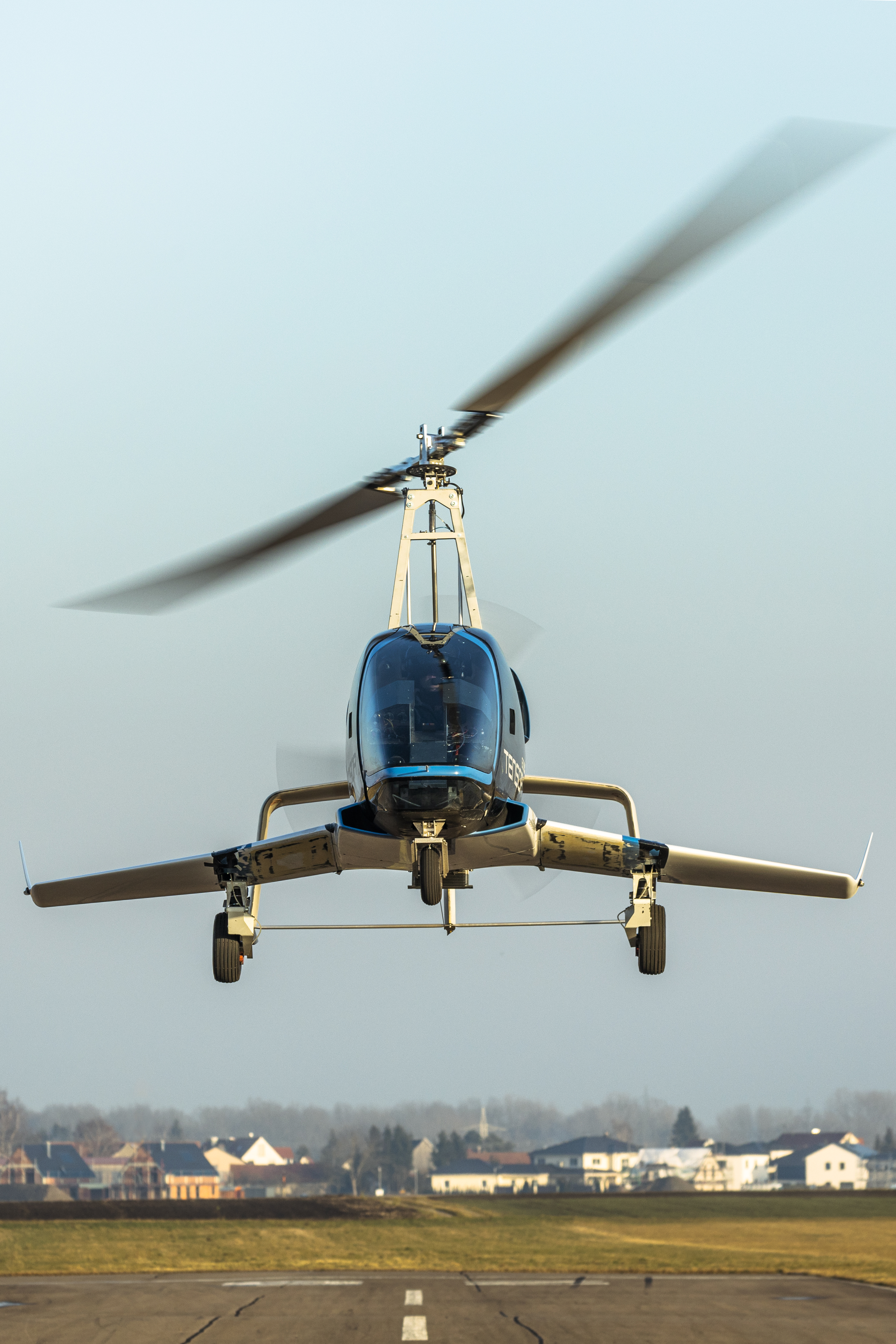 Erstflug des Technology Demonstrator Tensor 600X von Fraundorfer Aeronautics